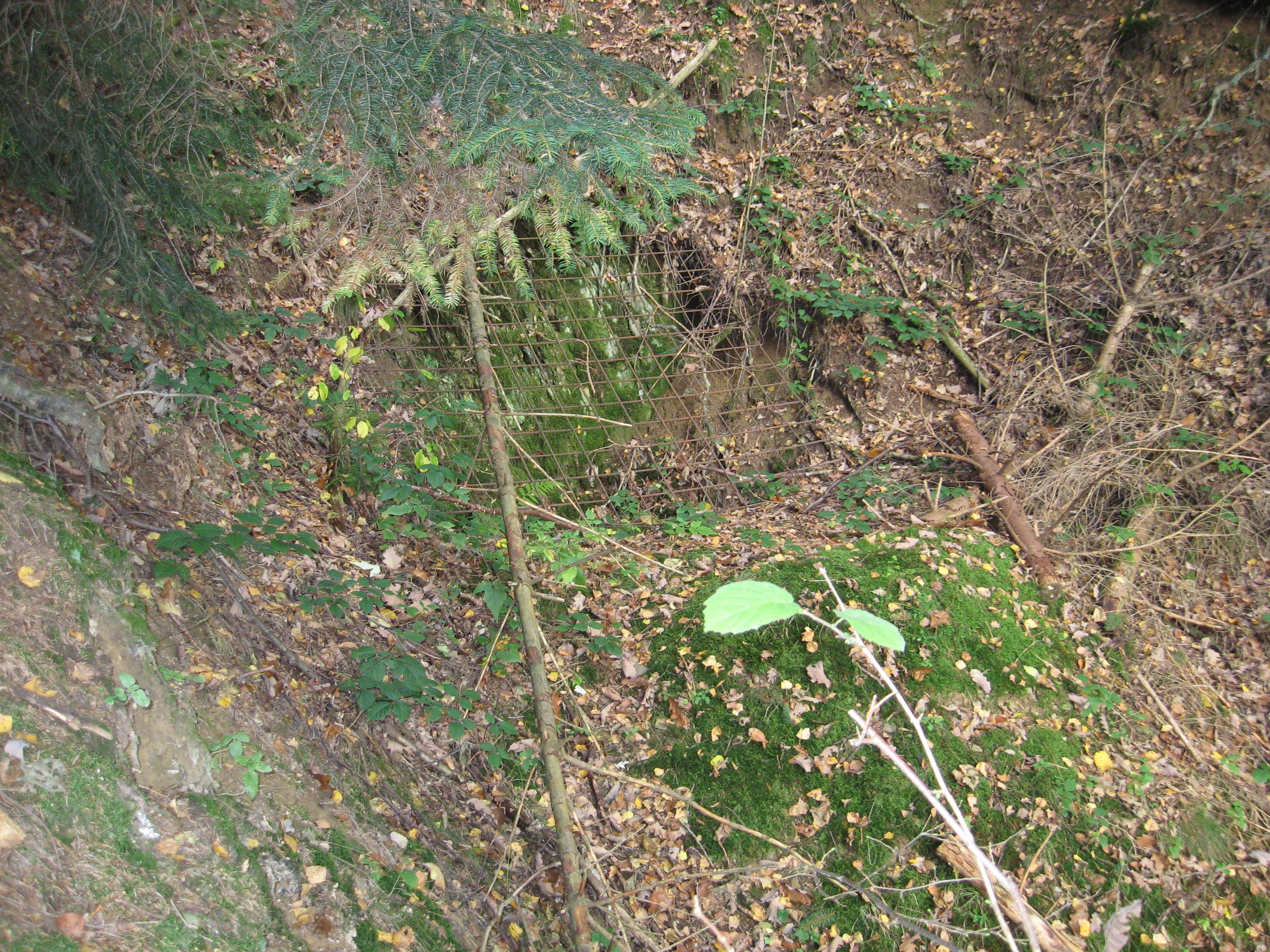 Stolleneingang der Grube Morgenröte bei Wilden (Wilnsdorf), Siegerland.